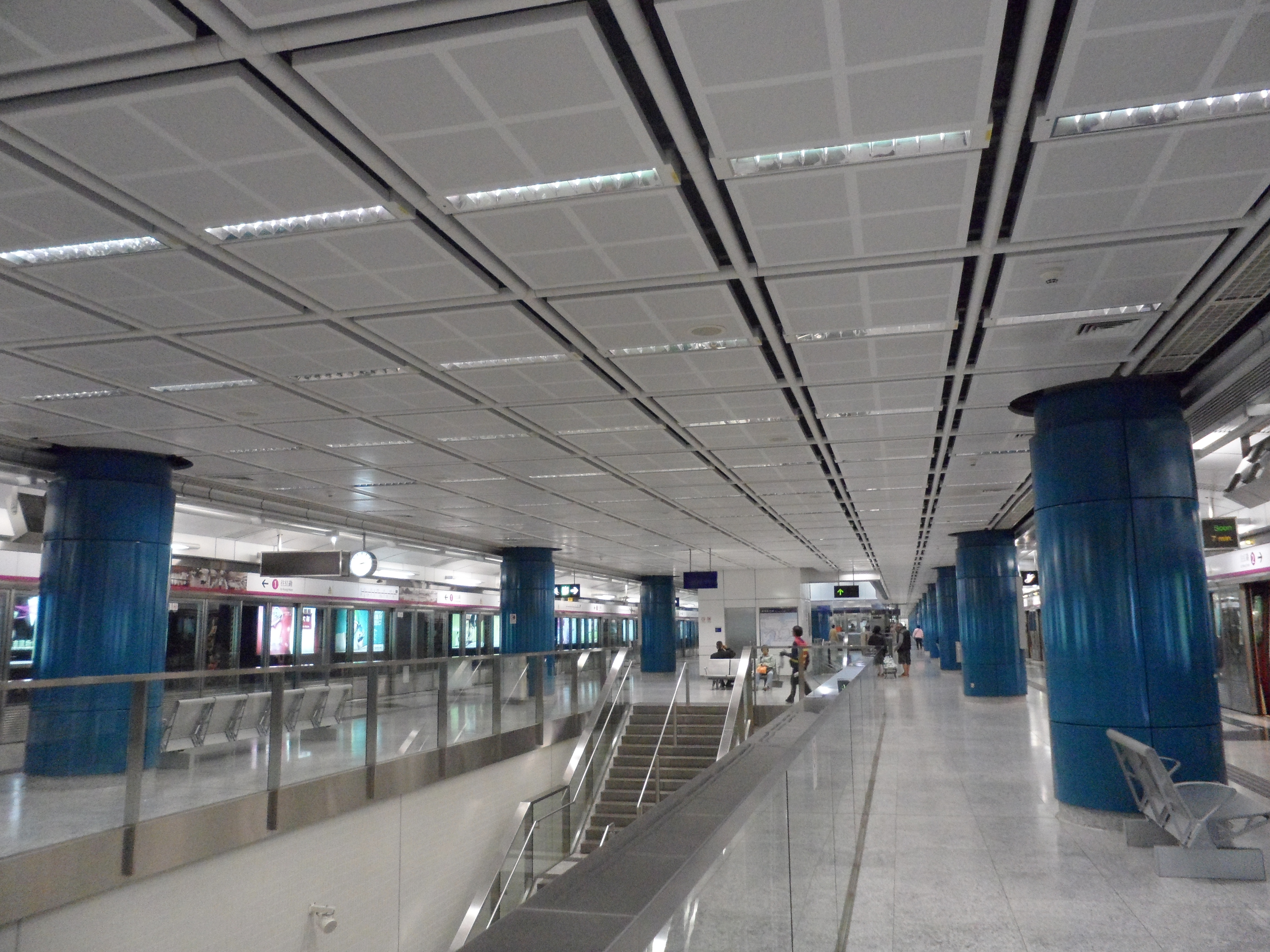 港鐵屯門站月台中央